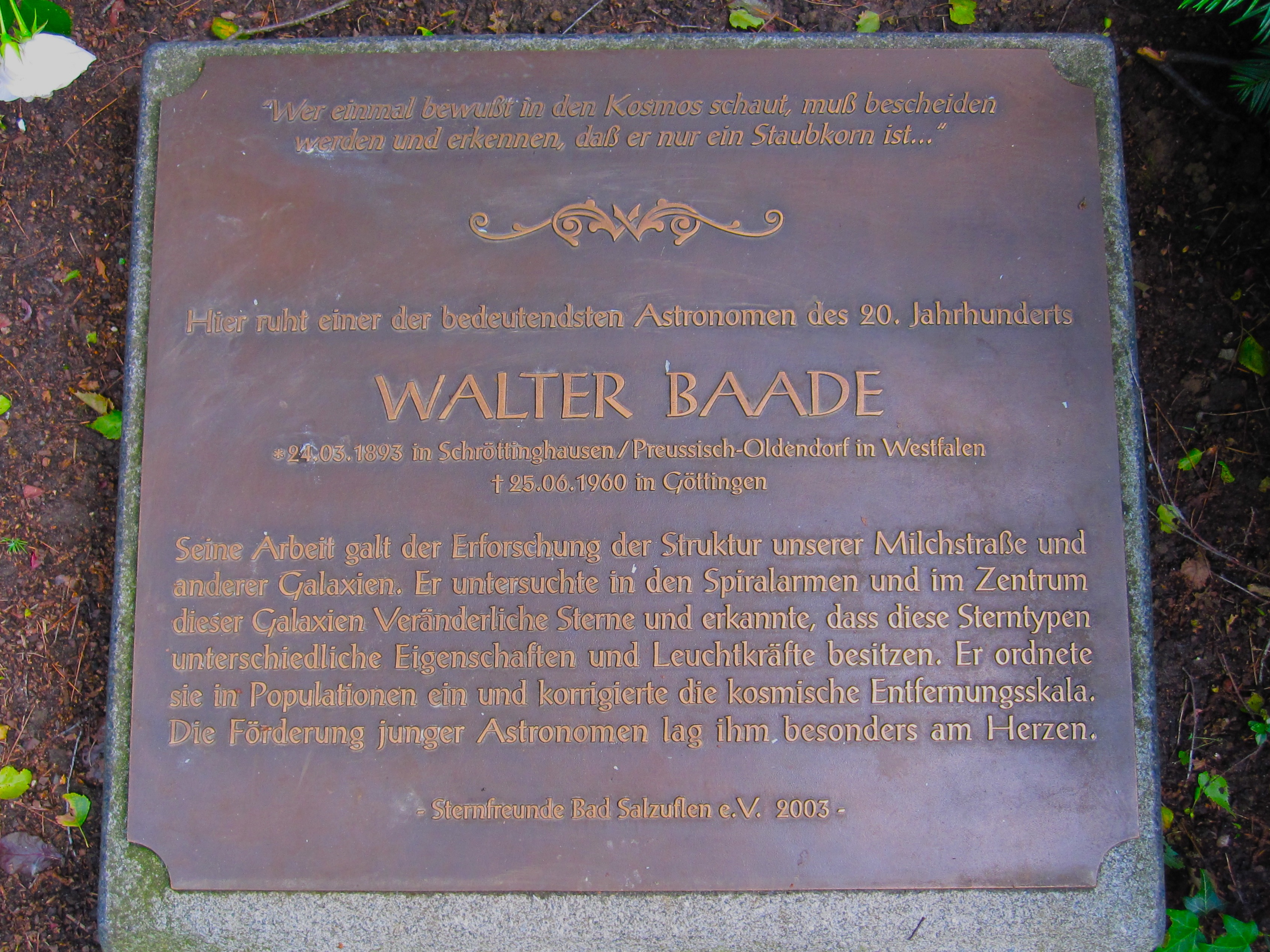 Bronzeplatte auf dem Grab von Walter Baade auf dem Obernbergfriedhof (Feld 41 Nr. 23-23a) in Bad Salzuflen